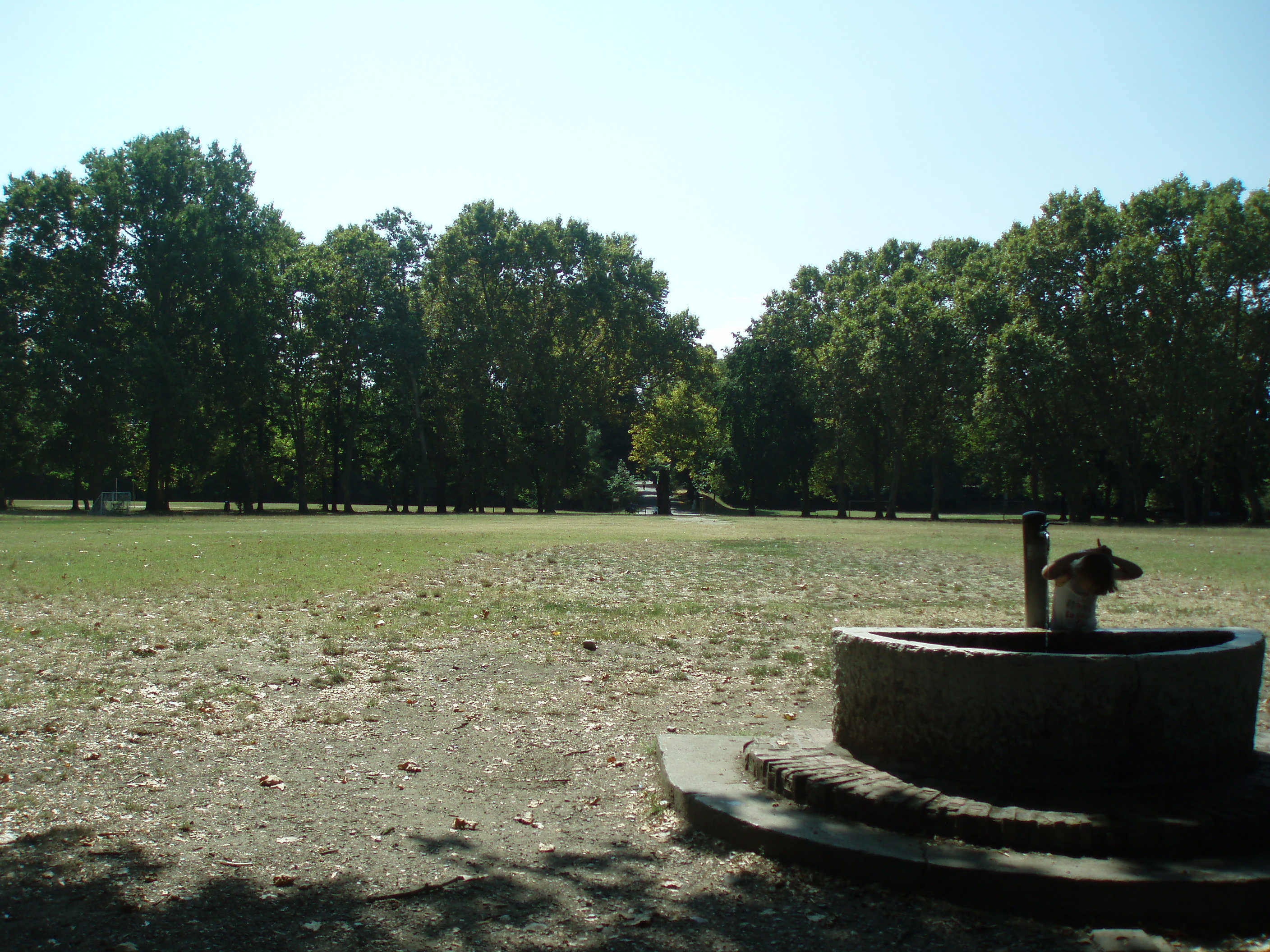 Cittadella This is a photo of a monument which is part of cultural heritage of Italy.